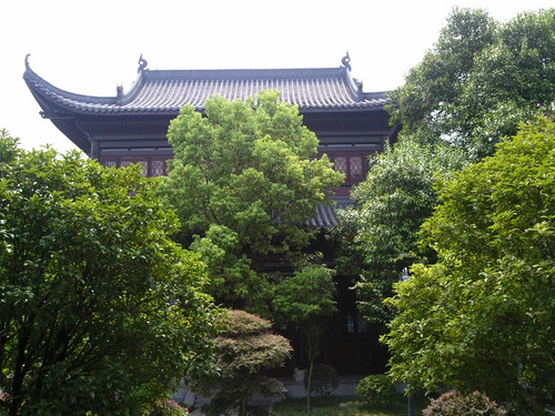 书院的一隅